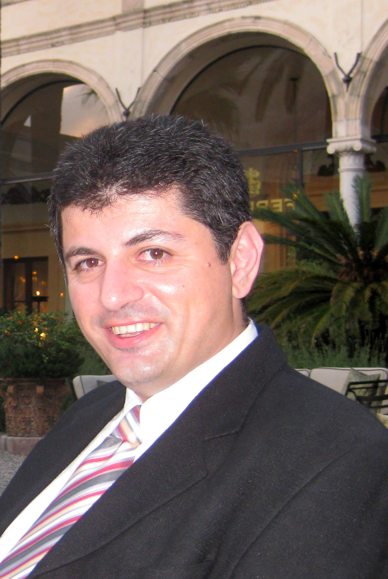 פרופסור קוסאשוילי יונה